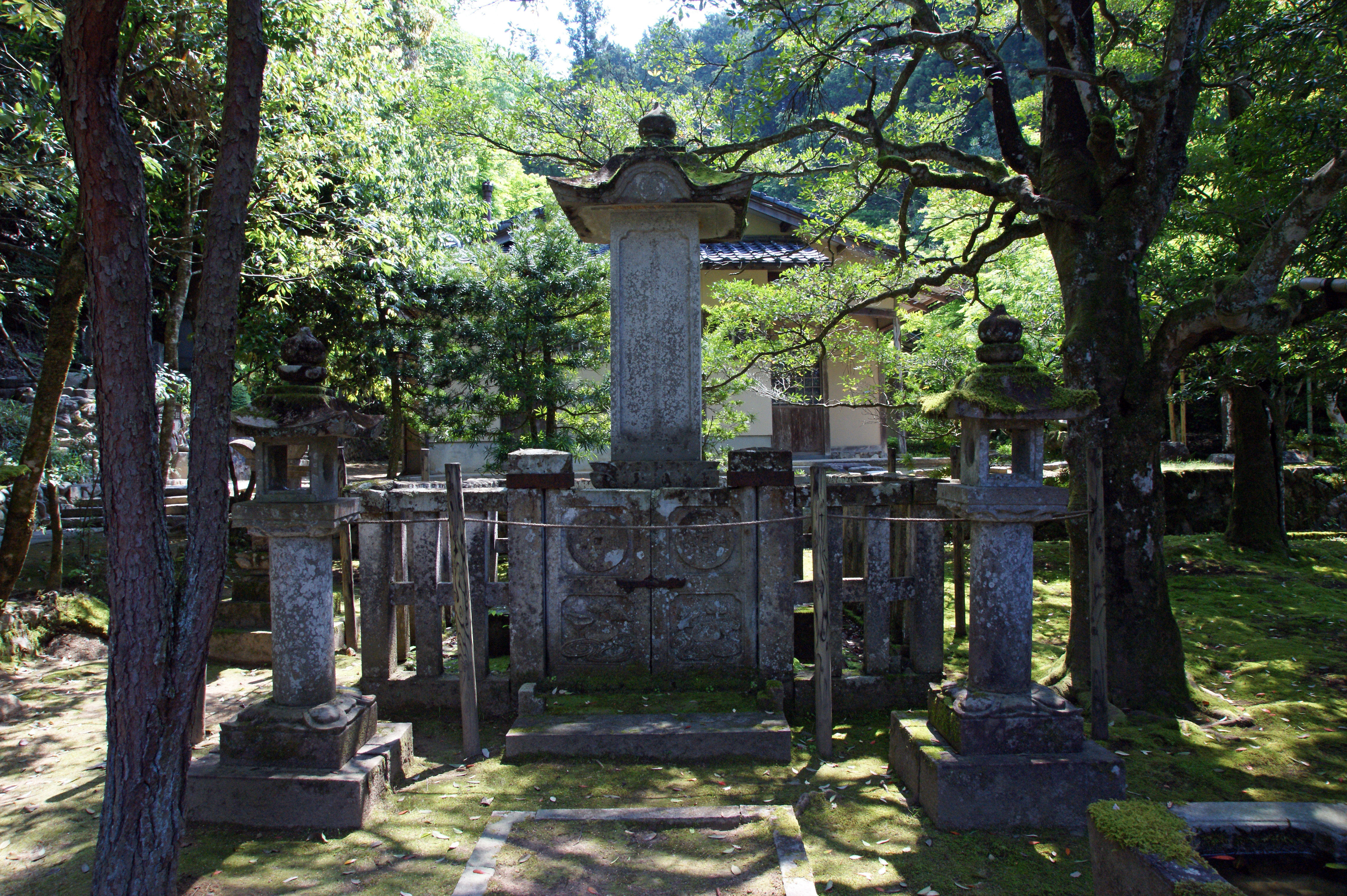 Sukyoji in Izushi, Toyooka, Hyogo prefecture, Japan